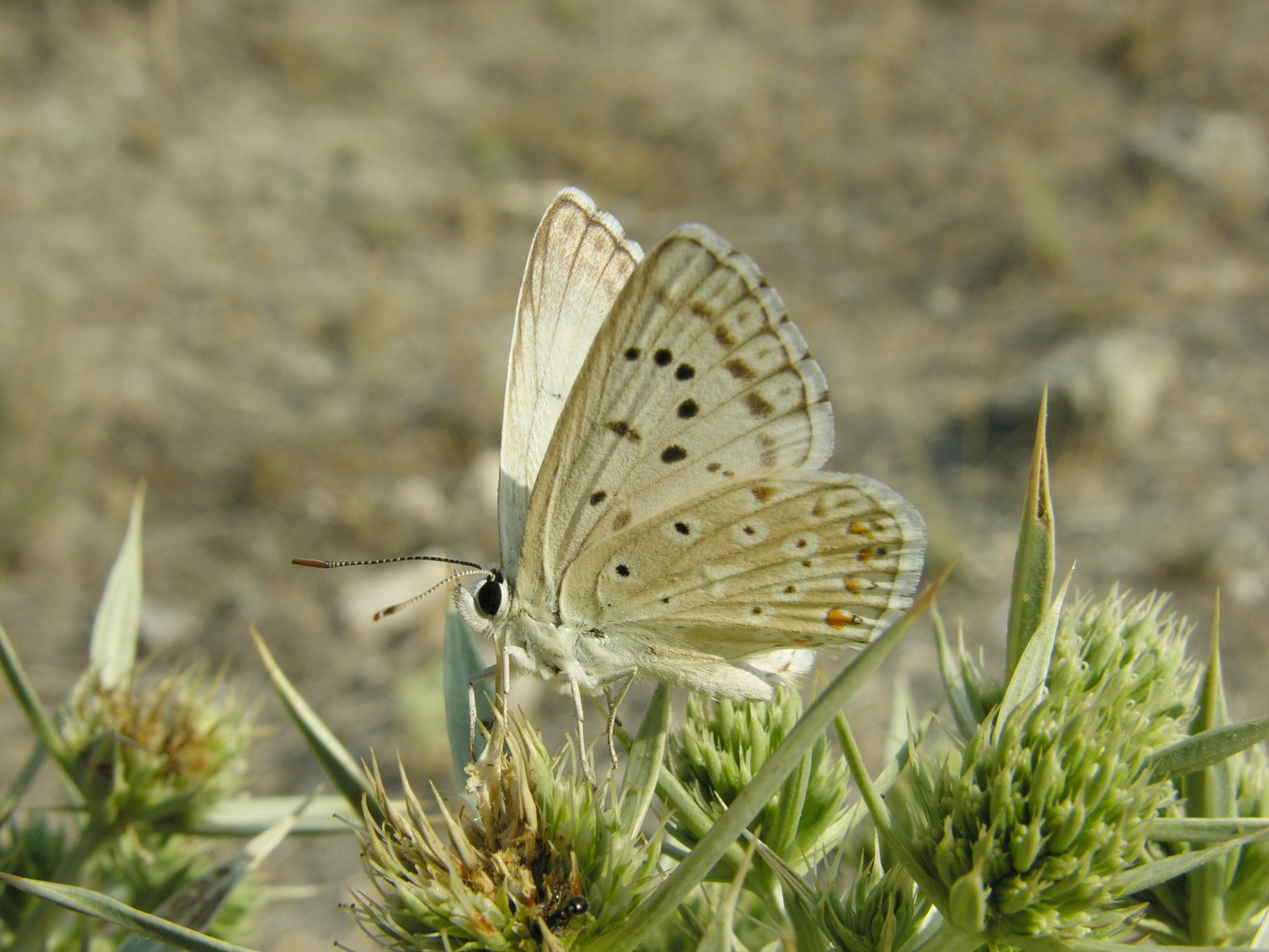 Lysandra albicans (Lycaenidae). Rivas Vaciamadrid, Madrid, España.